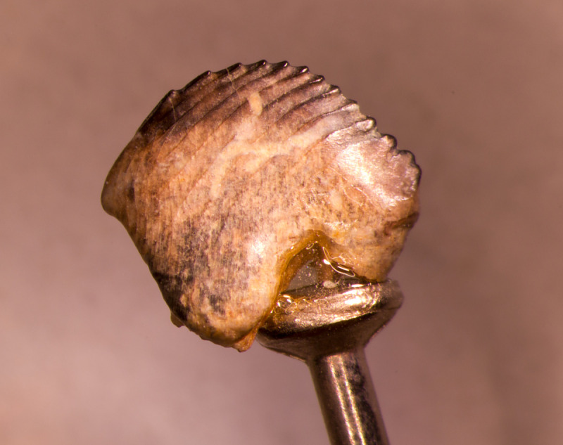 Cimolomys sp